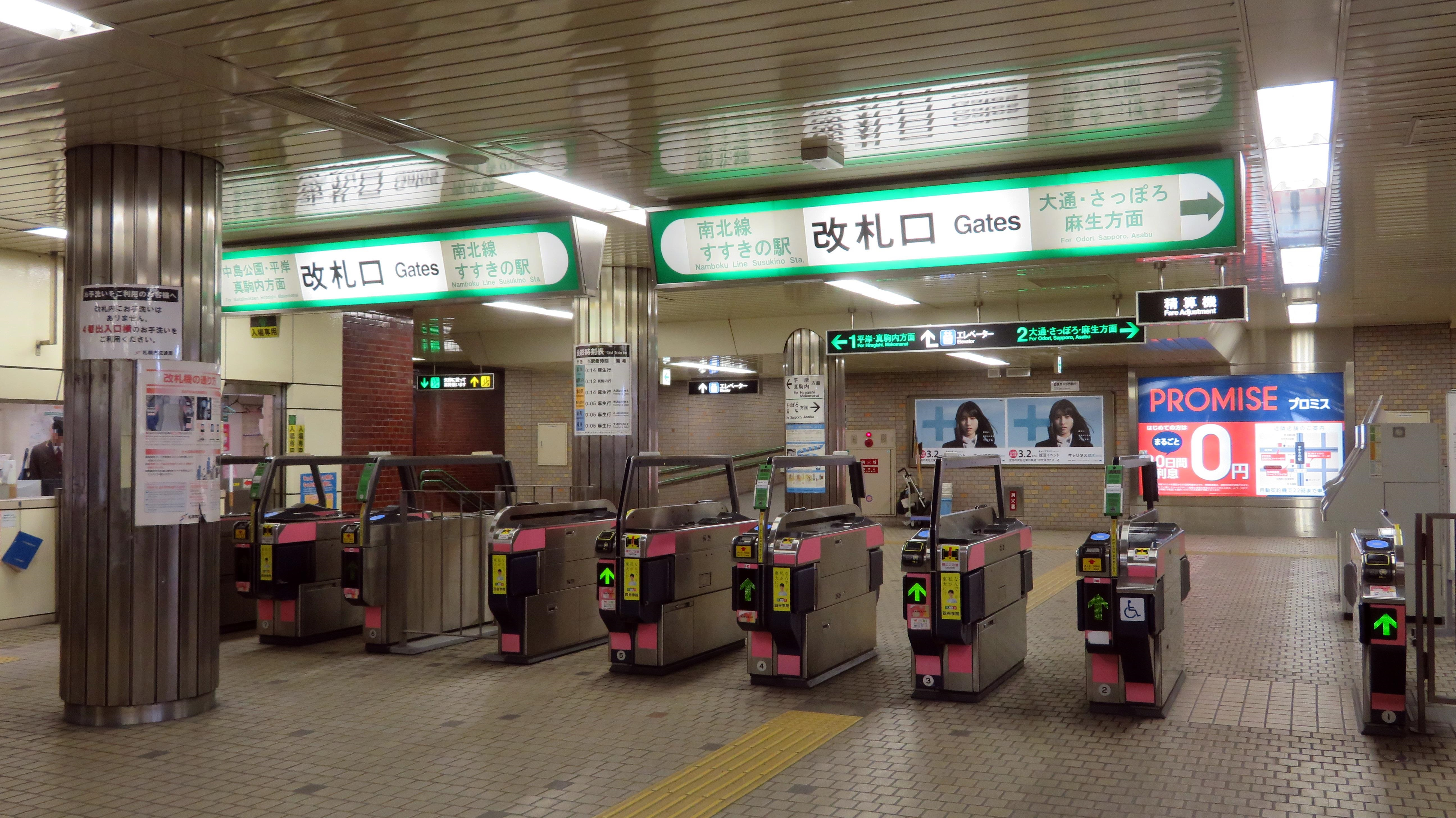 すすきの駅改札口 Canon PowerShot SX720 HS